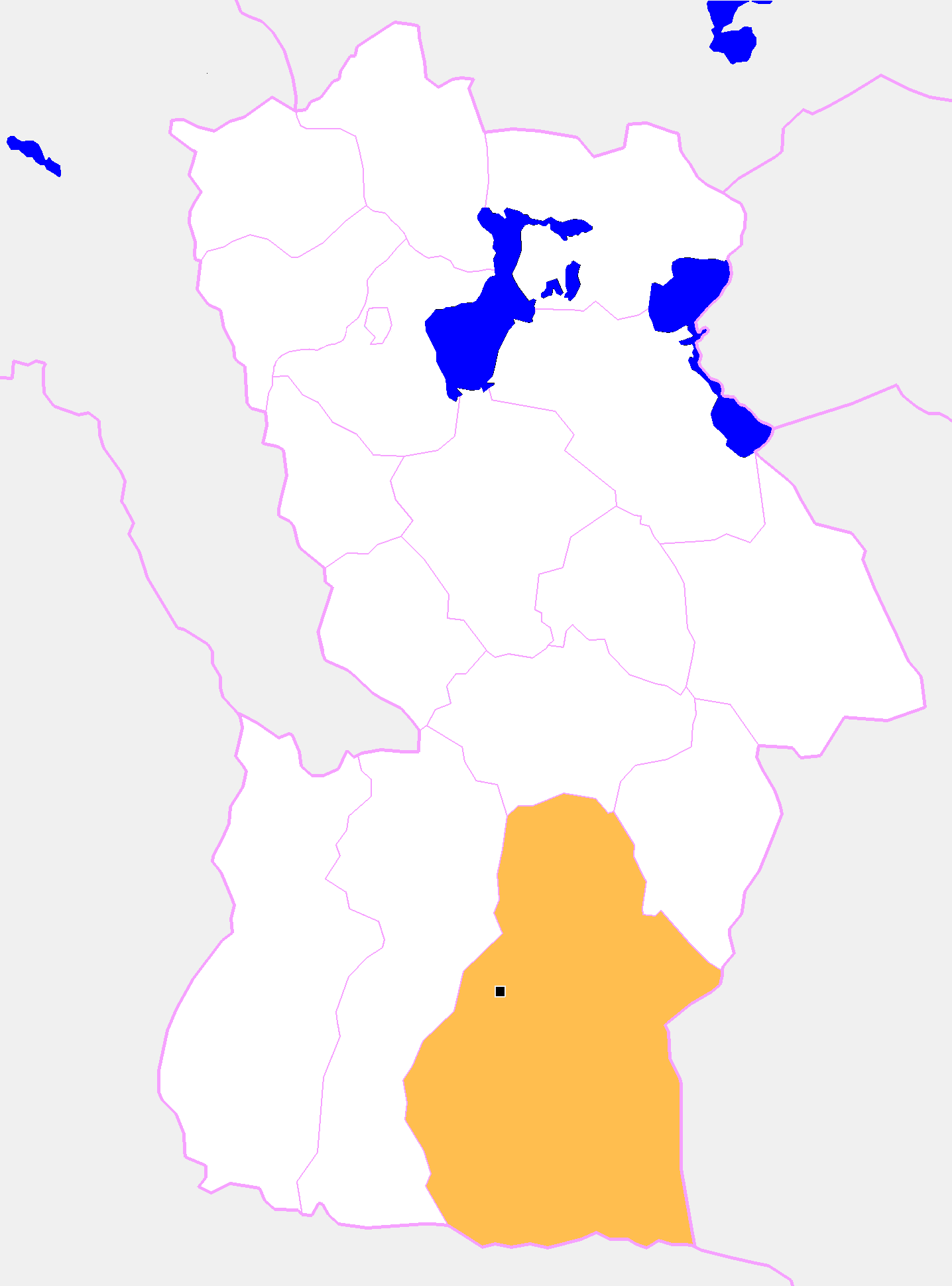 Монгол: Ховд - Алтай сум